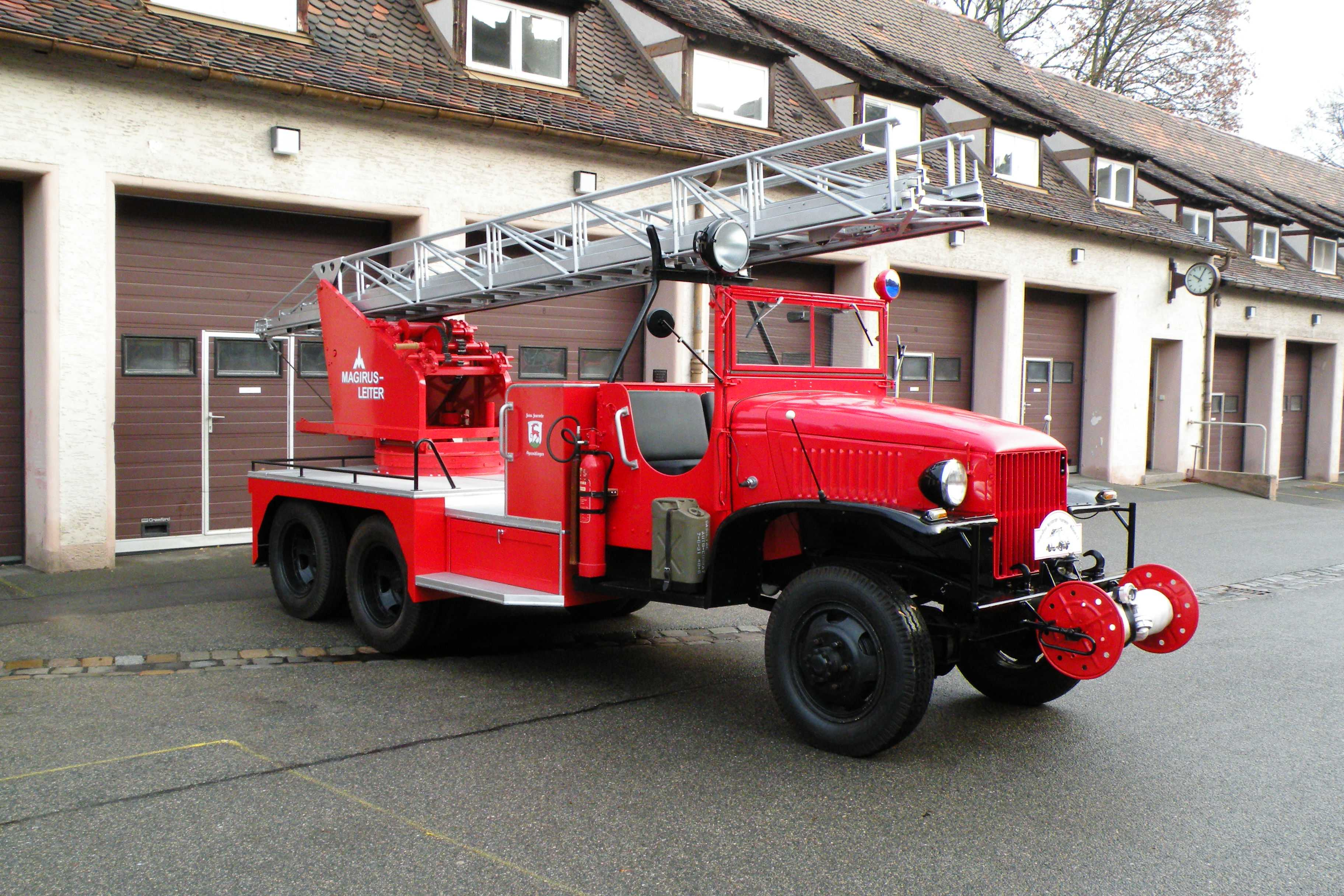 DL 17 Fahrgestell GMC / Leiterpark Margirus (ehemals FFW Sprendlingen)